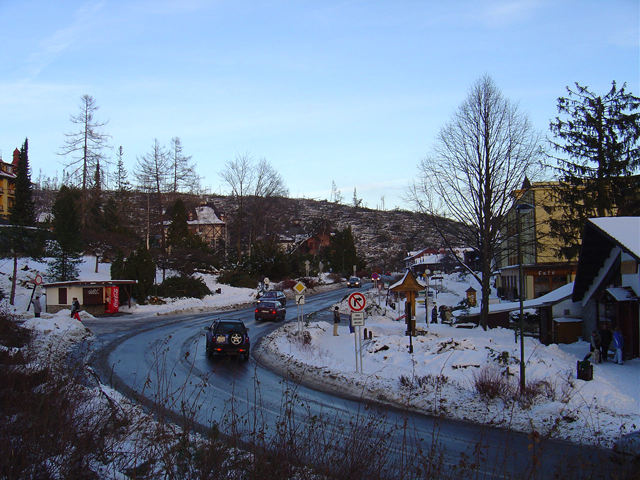 Centrum Starého Smokovca Obrázok odfotil Kristián Slimák.